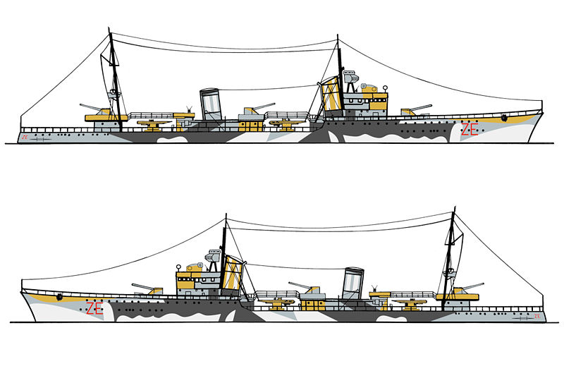 Profili del cacciatorpediniere Nicolò Zeno con la livrea mimetica sperimentale in uso dal novembre 1941 al novembre 1942